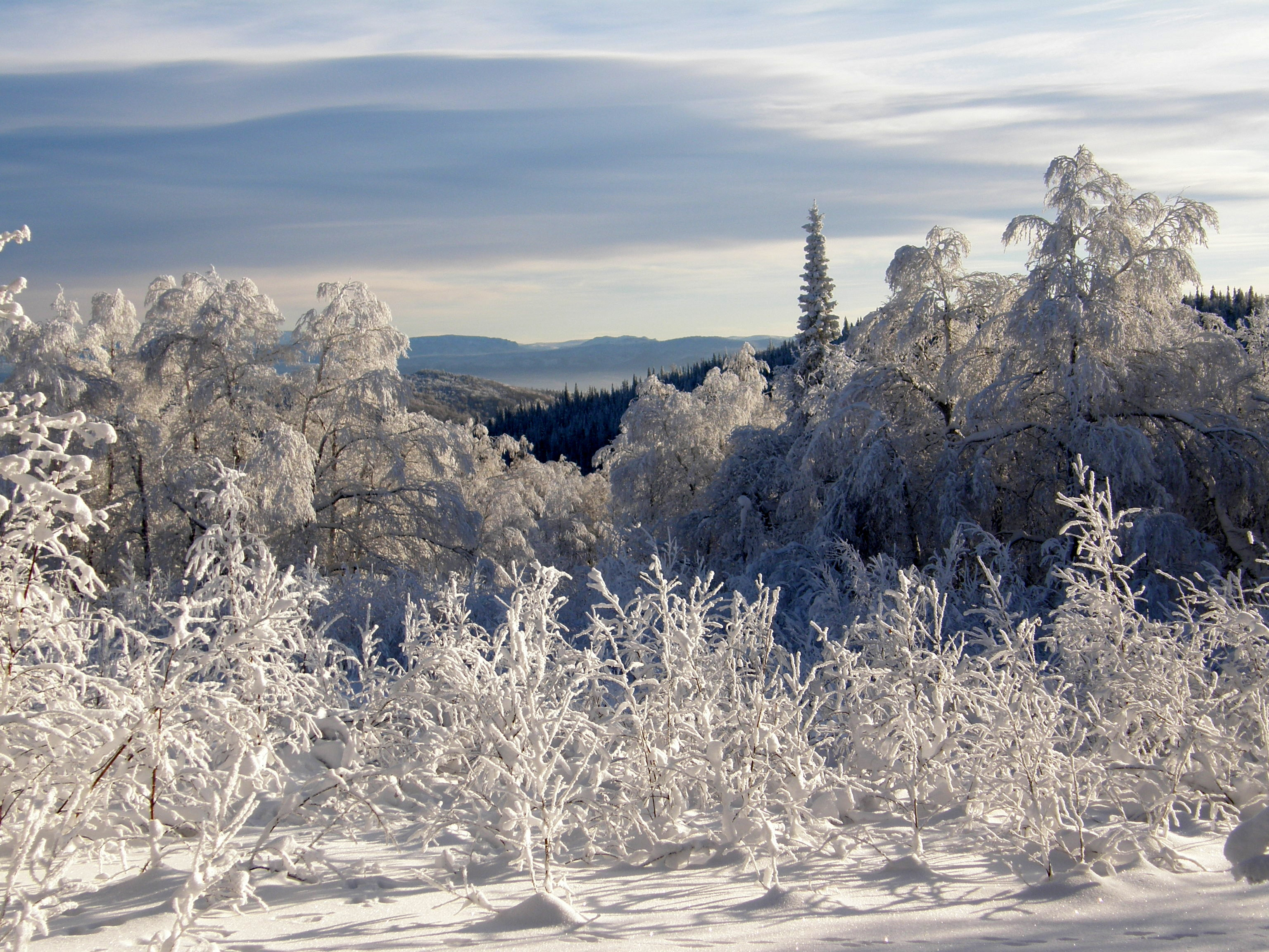 Южно-Уральский заповедник, Белорецкий район This image is related to the protected area of Russia number 0200073